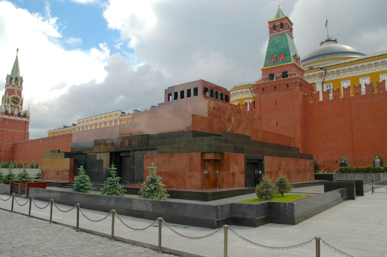 Lenin's Mausoleum